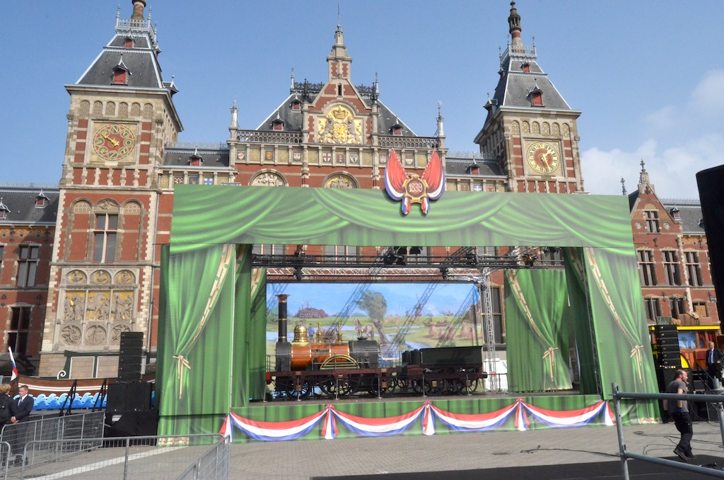 Locomotief 'De Arend' opgesteld voor het Centraal Station te Amsterdam i.v.m. 175 jarig spoorjubileum. Foto: Erik Swierstra.